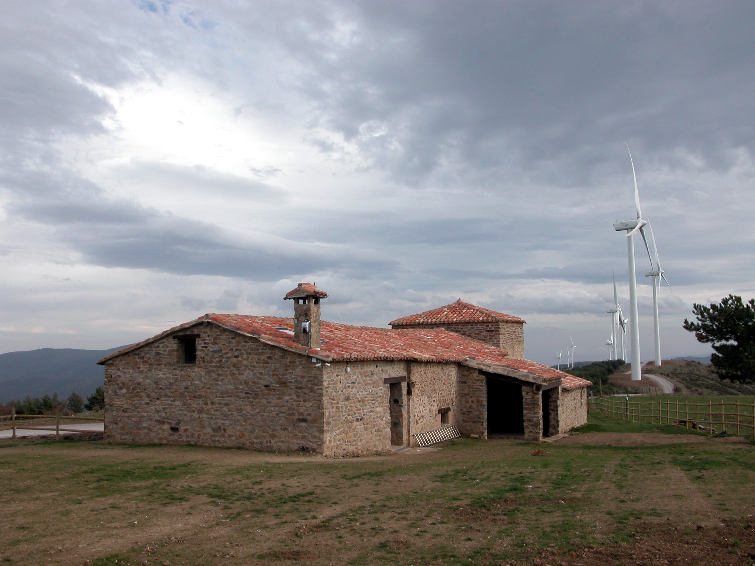 Ermita de Santa Ana en La Santa (Munilla - La Rioja - España)